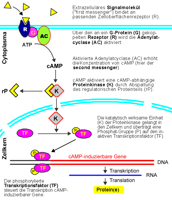 Stark vereinfachtes Schema eines typischen Signaltransduktionswegs über cAMP als Second-Messenger. Angeregt durch KNIPPERS,R. (2006): Molekulare Genetik, Thieme-Verlag und ALBERTS, B. (2001): Lehrbuch der Molekularen Zellbiologie, Wiley-VCH.